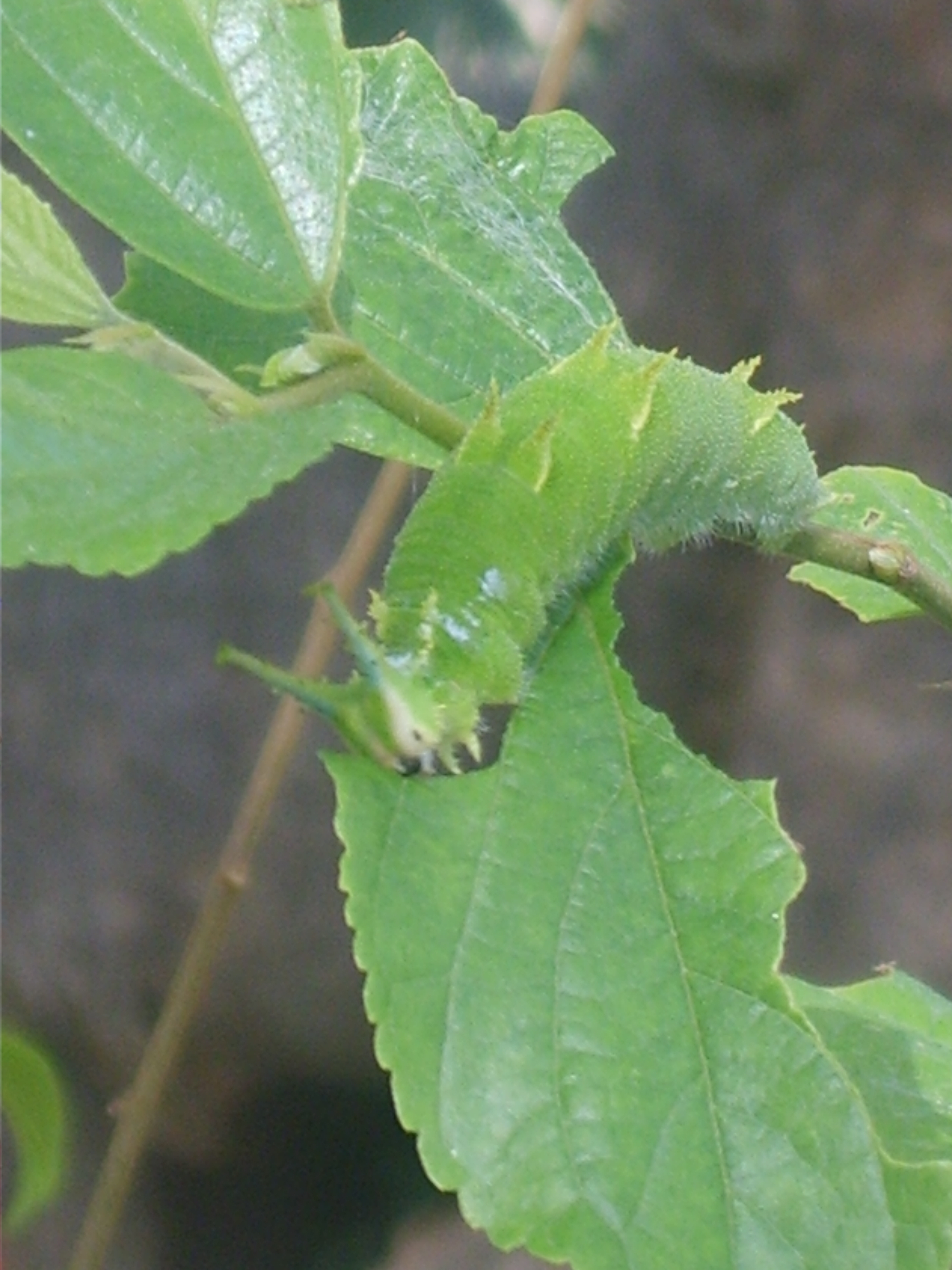 Sasakia charonda larva eating into Celtis sinensis's leaf. Hampyung Korea 팽나무 잎을 먹고 있는 왕오색나비 애벌레. 함평 나비축제 국제나비관에서 찍음.